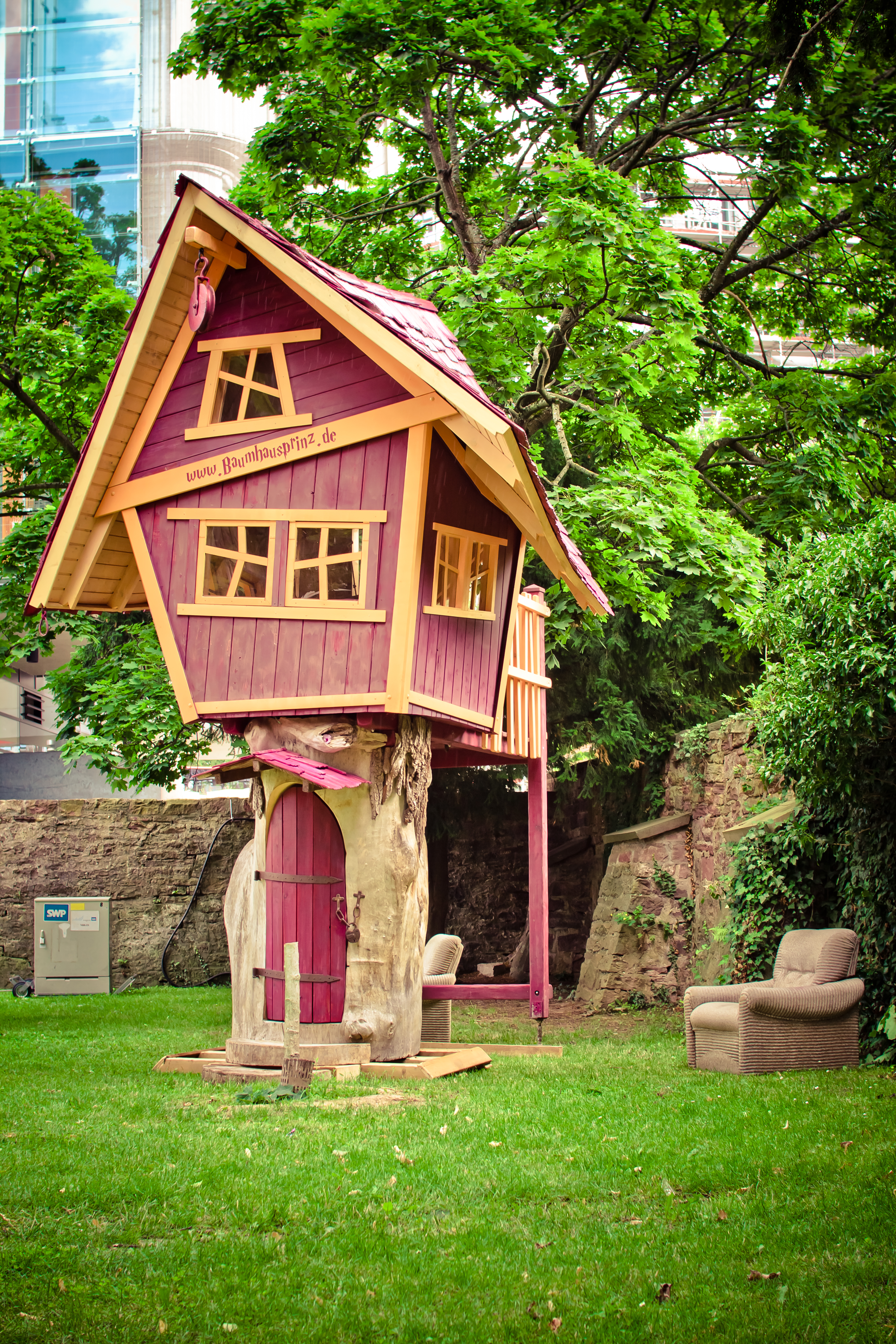 Impressionen Europäische Sommerlounge 1